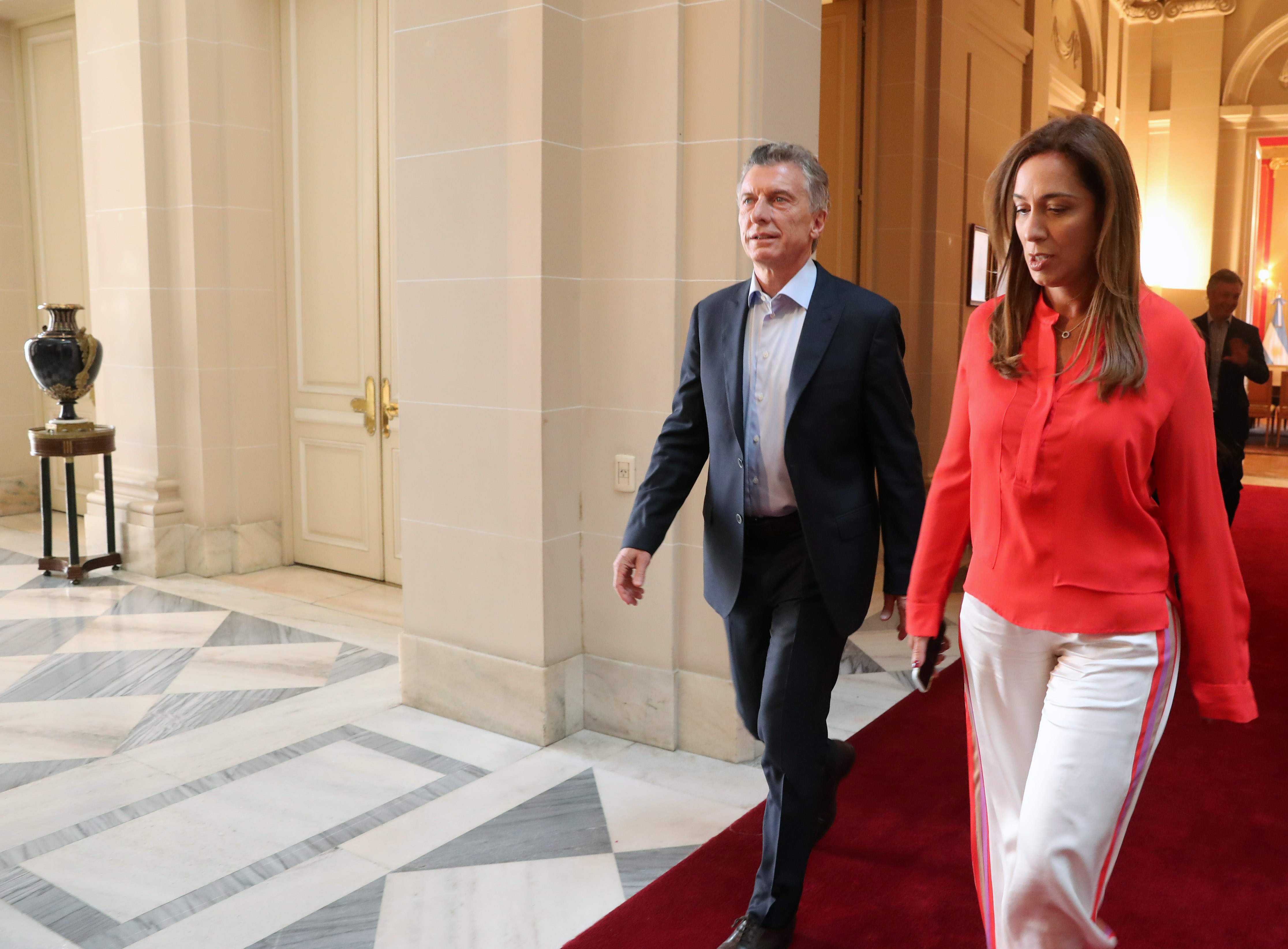 El presidente Macri participó de una reunión con la gobernadora, Maria Eugenia Vidal y el gabinete del gobierno bonaerense.